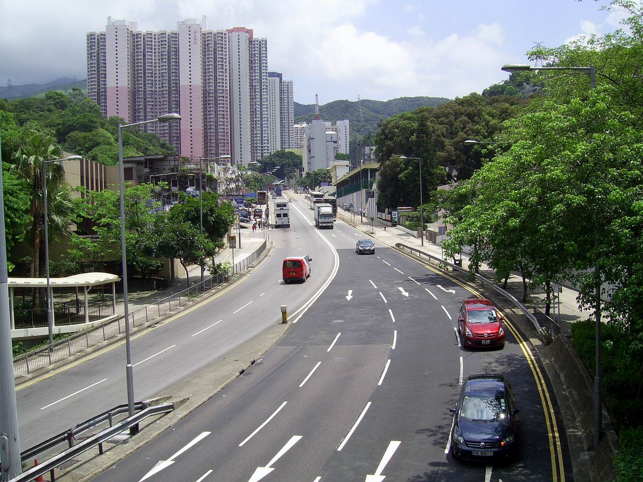 中文（香港）: 梨木樹(一)邨